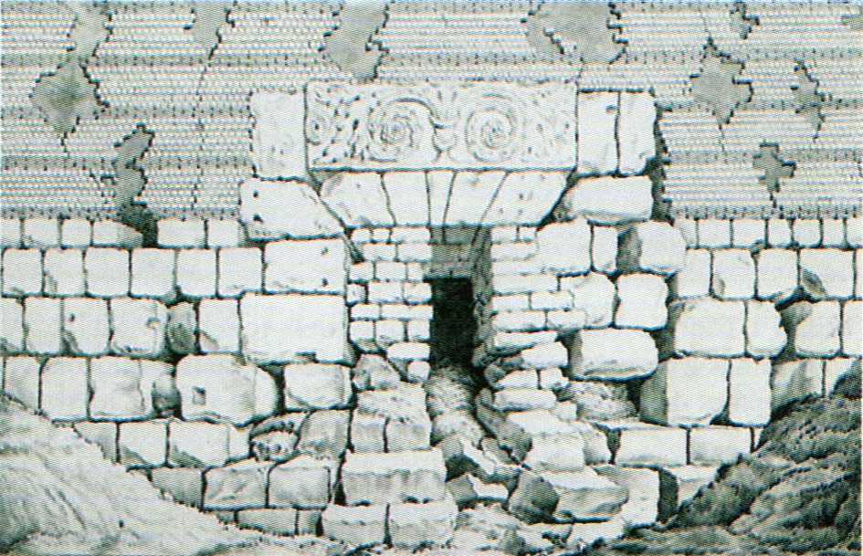 Poterne nord-ouest dans le rempart gallo-romain du château de Tours avec la frise dite "du tombeau de Turnus". Dessin de Beaumesnil, Antiquités et Monuments de la Touraine, 1784[1] (microfilm au cabinet des estampe de la BnF, collection A. Lenoir, dossier Gb[2]), également reproduit dans Henri Galinié, Tours Antique et médiéval, FERACF, 2007, p.251 et Vassy Malatra, Le château royal de Tours : nouvelles approches, in bulletin de la société archéologique de Touraine, 2011, p. 127.